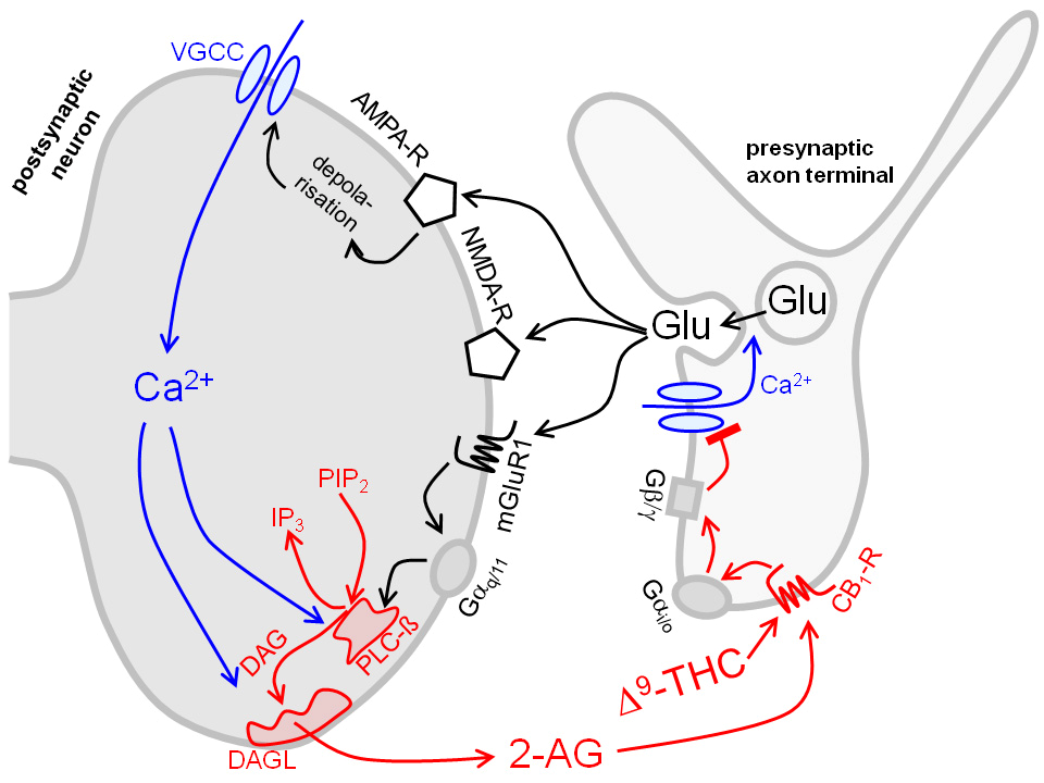 Schema einer Synapse mit CB-Rezeptor